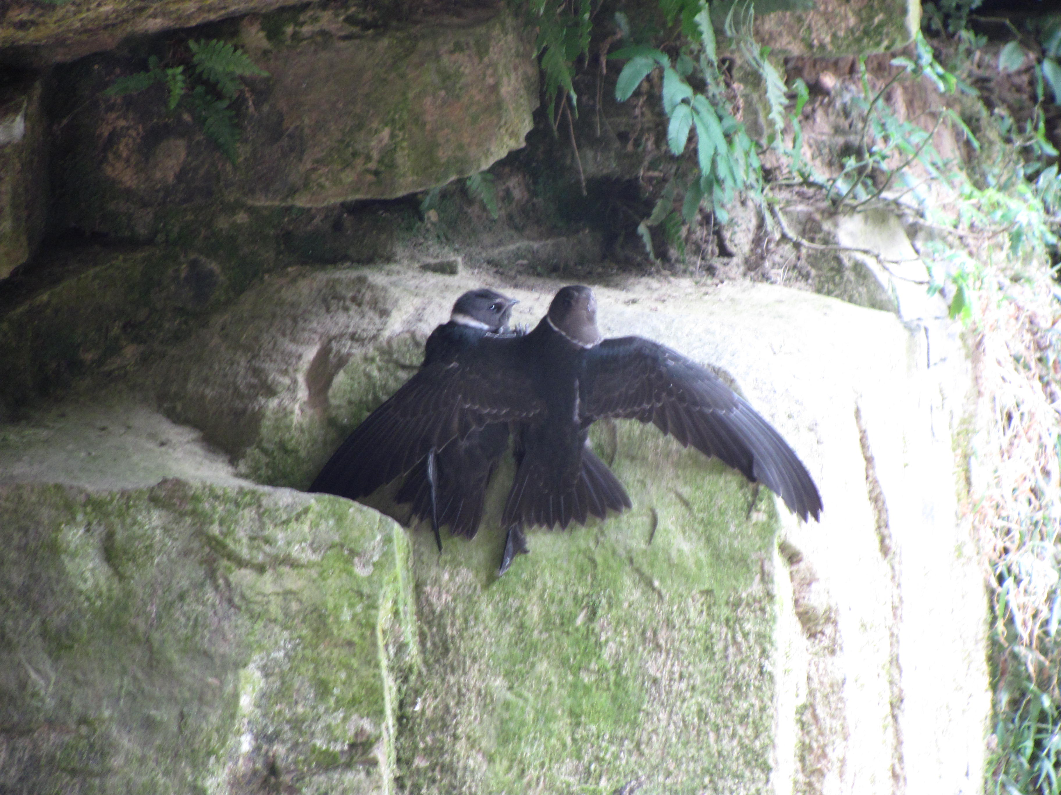 Streptoprocne zonaris.